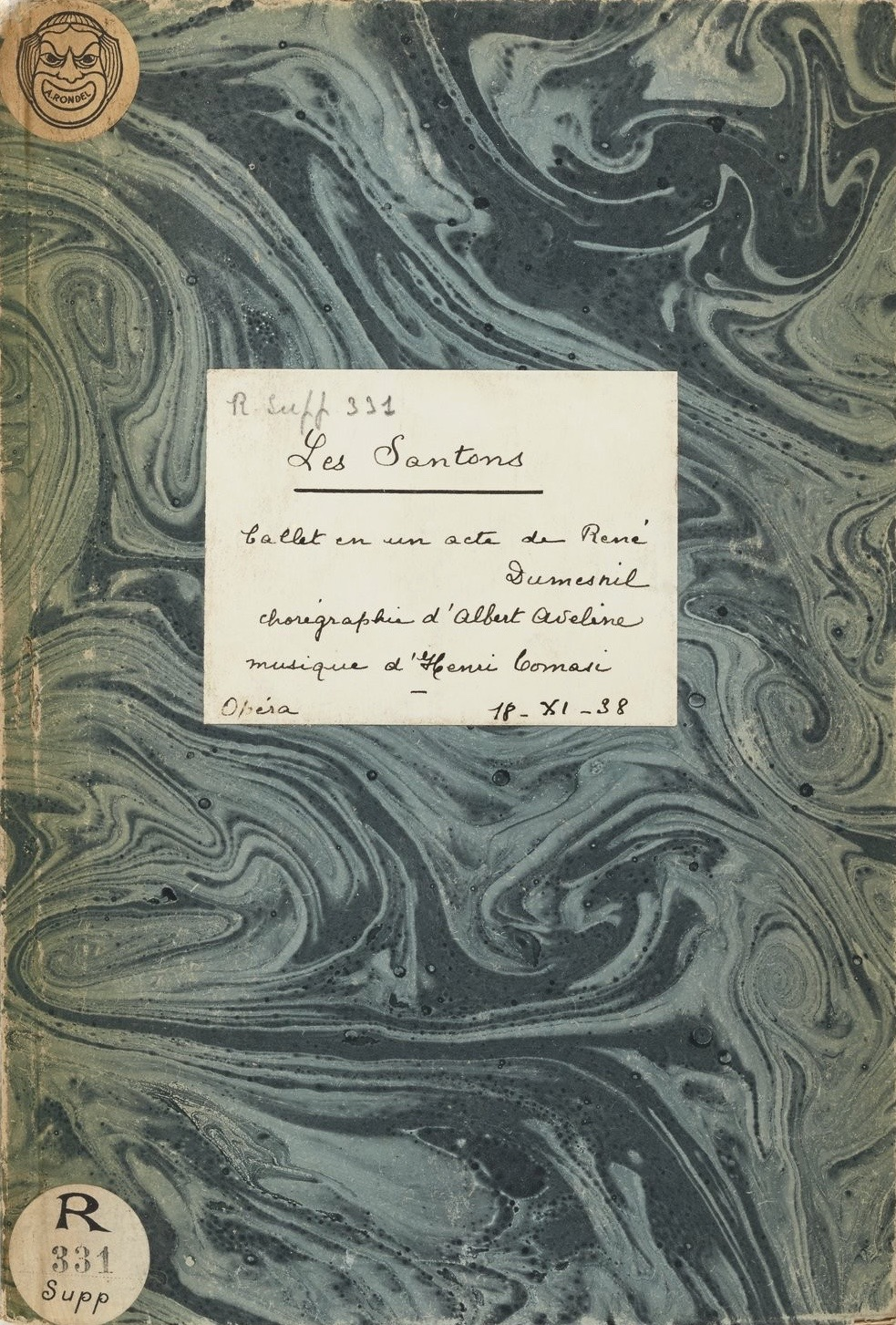 Recueil. "Les santons" de René Dumesnil], ballet en un acte, couverture, 1938.